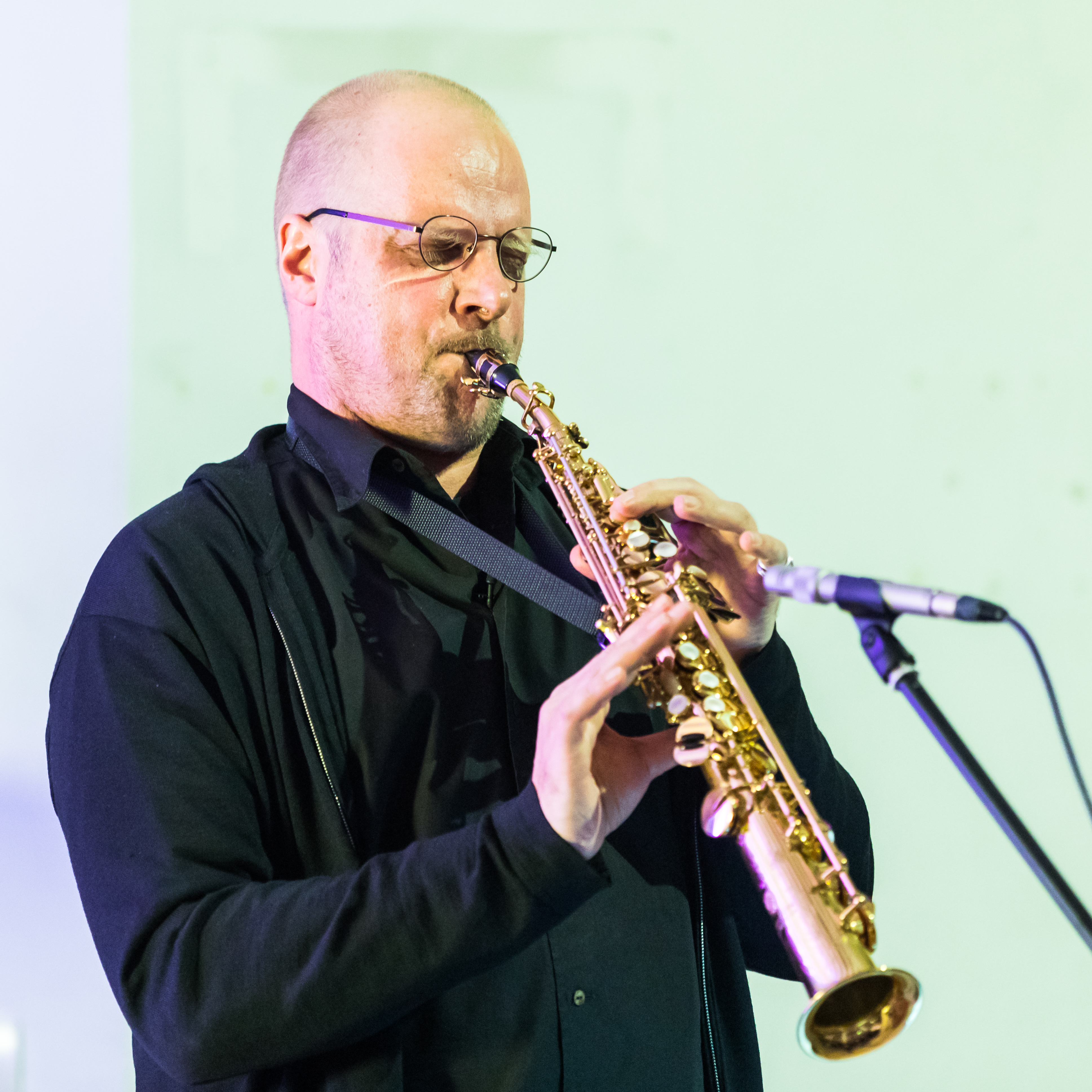 Ein Abend mit der „Mutter“ der Fluxus-Bewegung Mary Bauermeister. Im Rahmen der Sonderausstellung „KÖLN 68! Protest. Pop. Provokation.“ traten Mary Bauermeister und ihr Sohn Simon Stockhausen gemeinsam auf die Bühne. Mit dabei auch der Künstler Gregor Zootzky mit seinem Zeichentrick-Kurzfilm „Psst pp Piano – Hommage à Mary Bauermeister“.